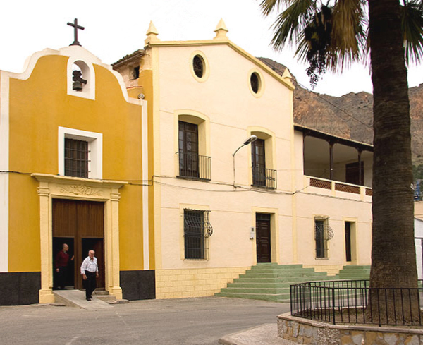 Ermita de San Antón. Orihuela